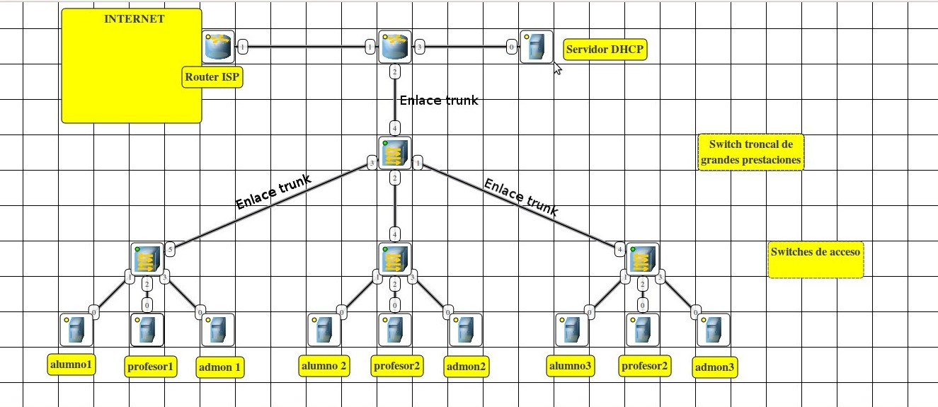 Ejemplo de una red institucional conmutada, en la que se definen tres VLANs (alumnos, profesores, administración). Tiene un diseño jerárquico dónde hay switches de acceso, un switch troncal y un router para dirigir tráfico entre VLANs.